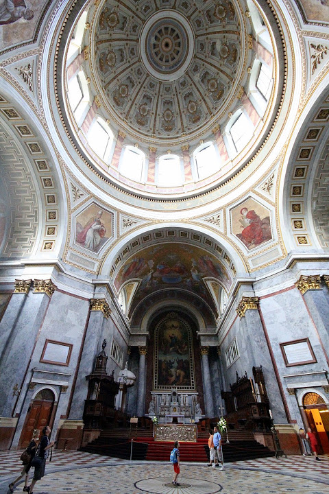 A kupola